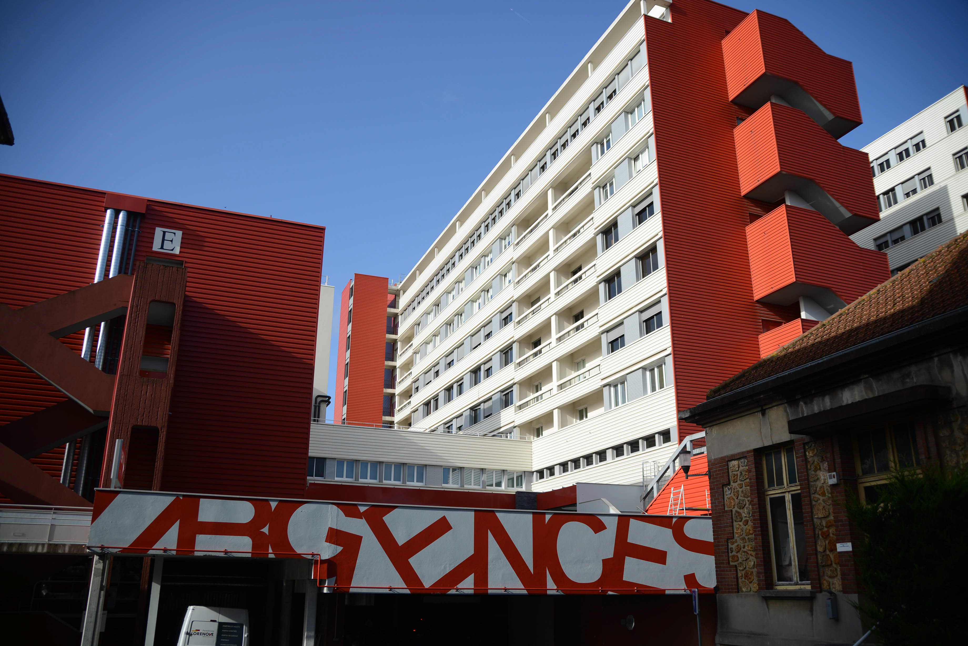 Longjumeau